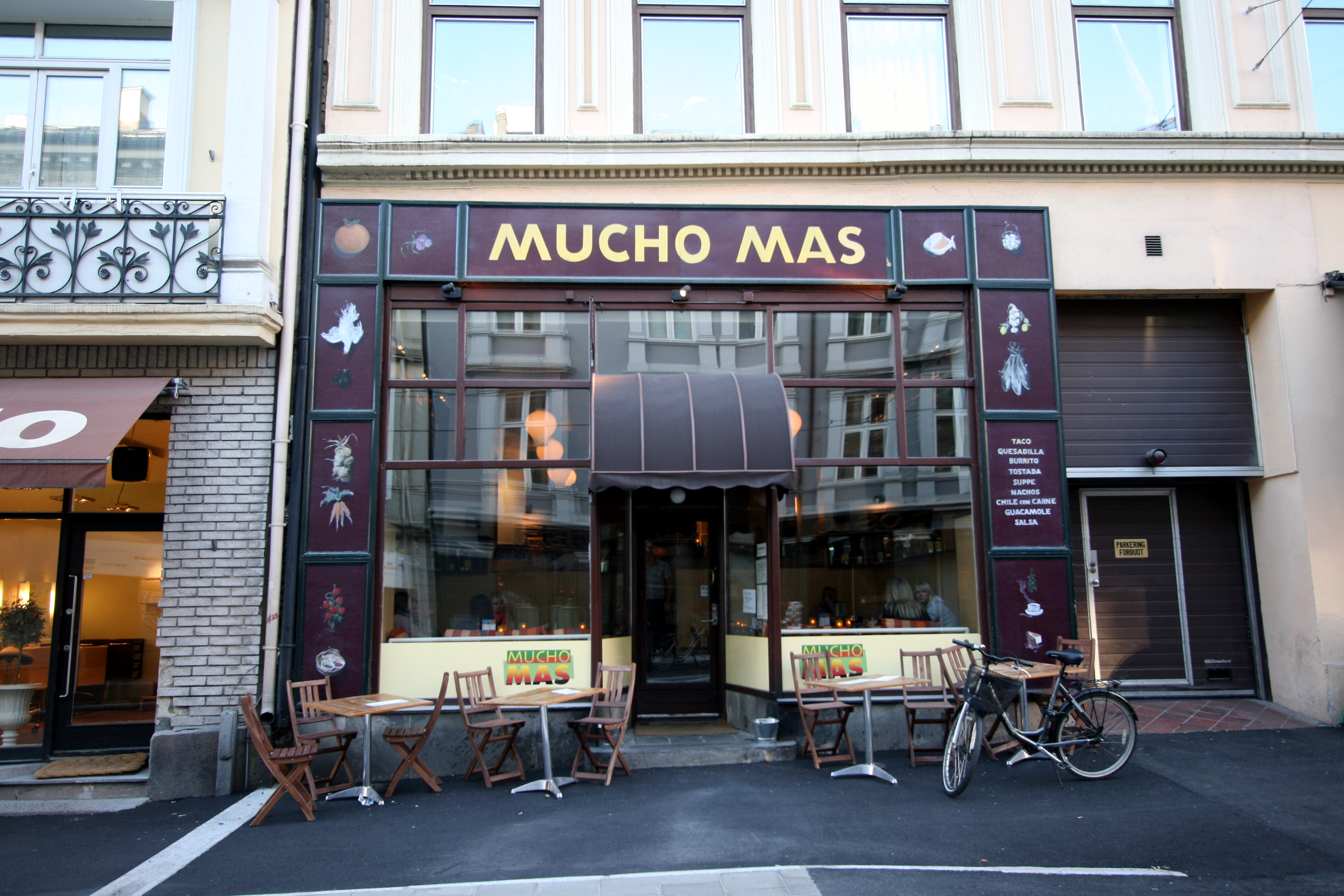 Mucho Mas i Holtegata (addr. Bogstadveien 8) på Hegdehaugen i Oslo.